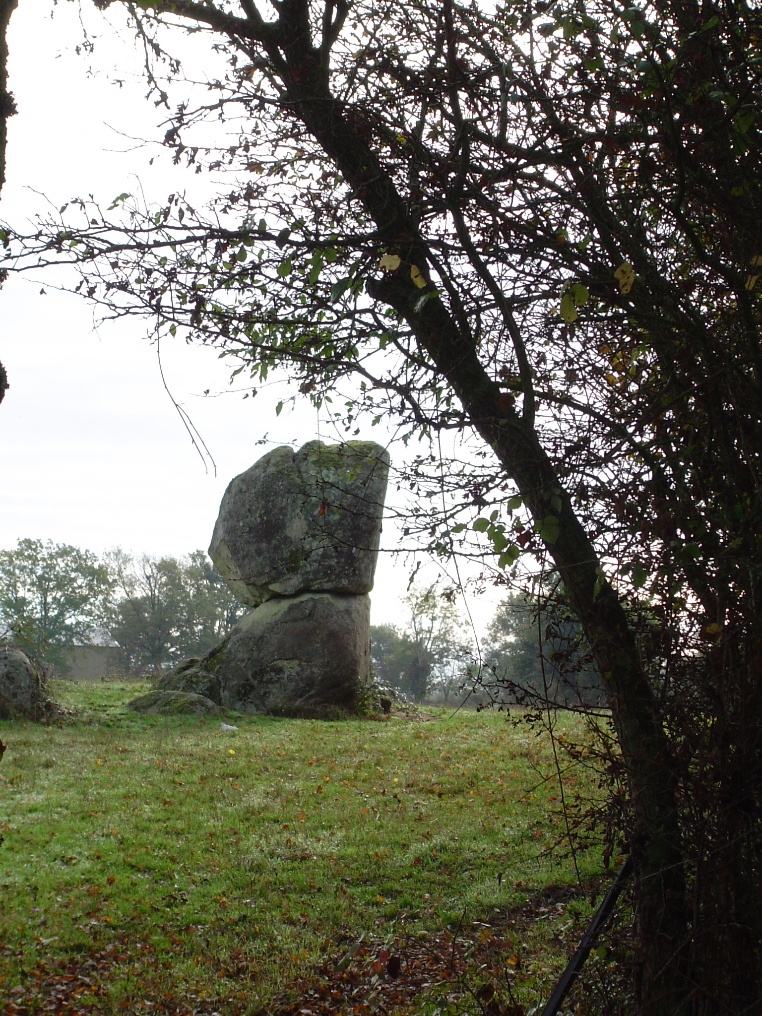 Pierres superposées à la Petite Foucherie des Cerqueux (Maine-et-Loire, France), peut-être d'origine Celtique.